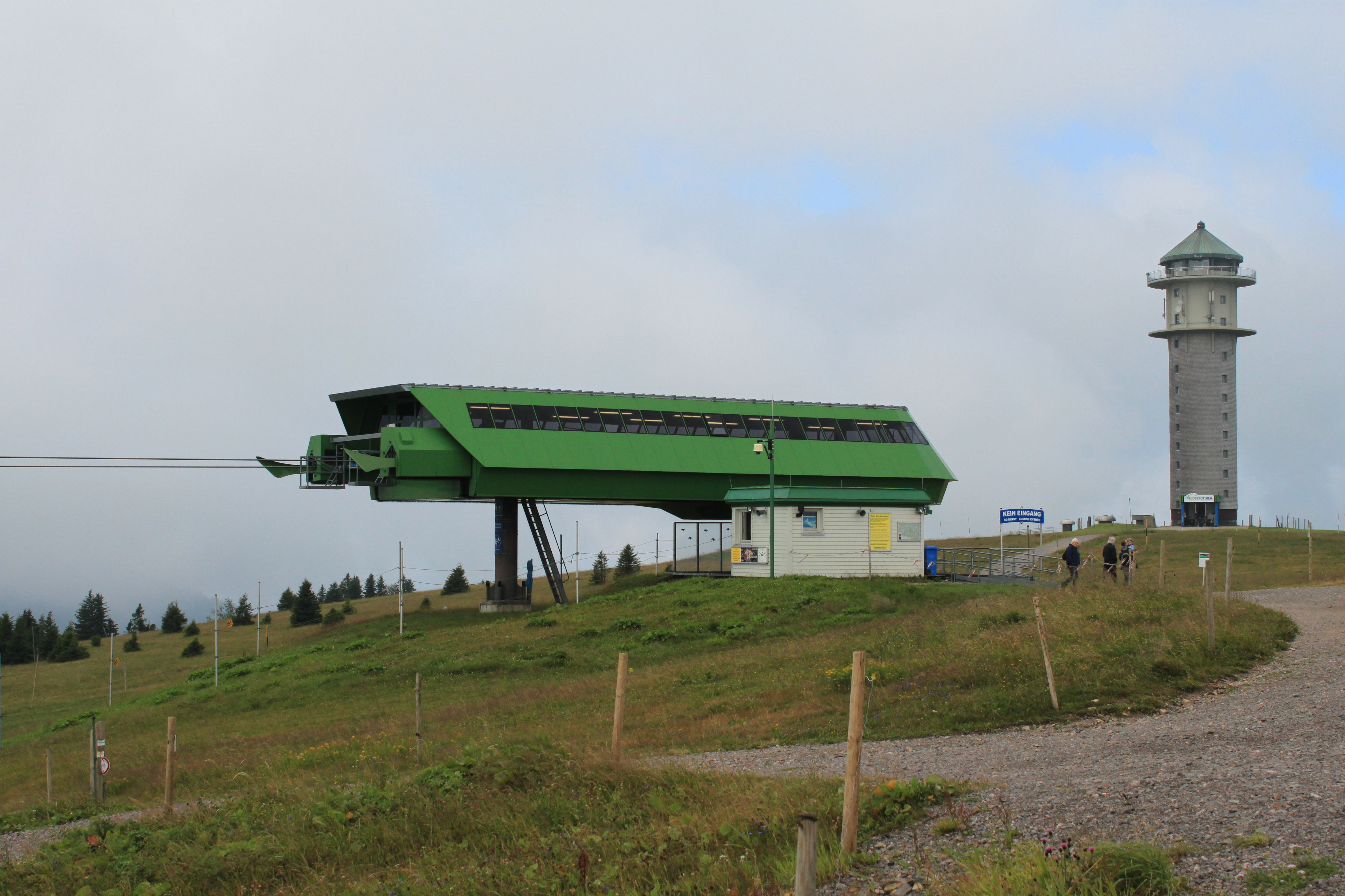 Am Seebuck